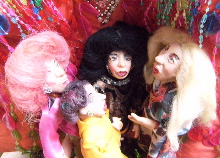 Tima, die Göttliche - Puppen handgemacht - Ovo, Tima, BeV, Ichgola (v. li.)